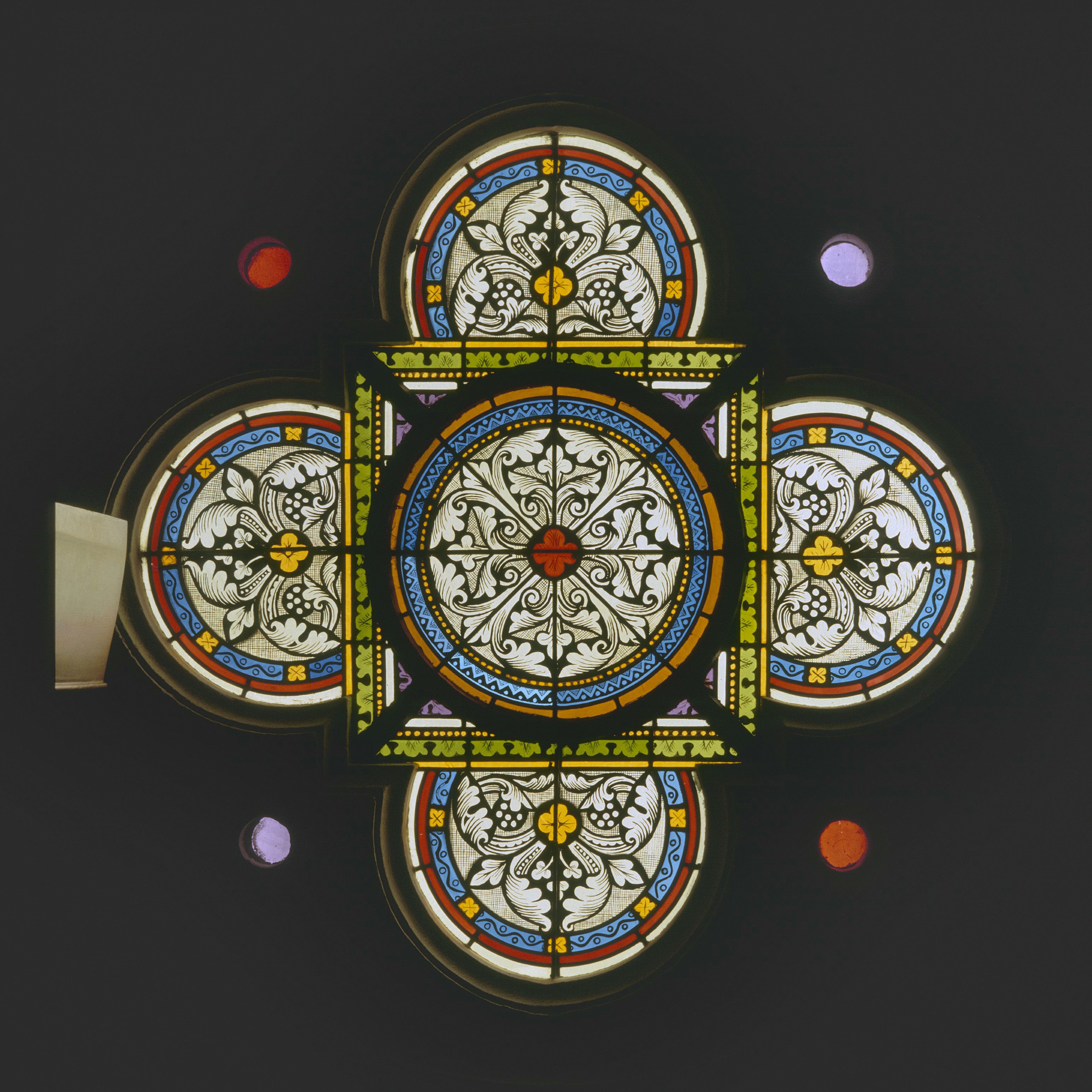 Rooms-katholieke Sint-Urbanuskerk: Interieur, gebrandschilderd glas-in-loodraam, Grisailleraam (opmerking: Gefotografeerd voor Glas in lood in Nederland 1817-1968)